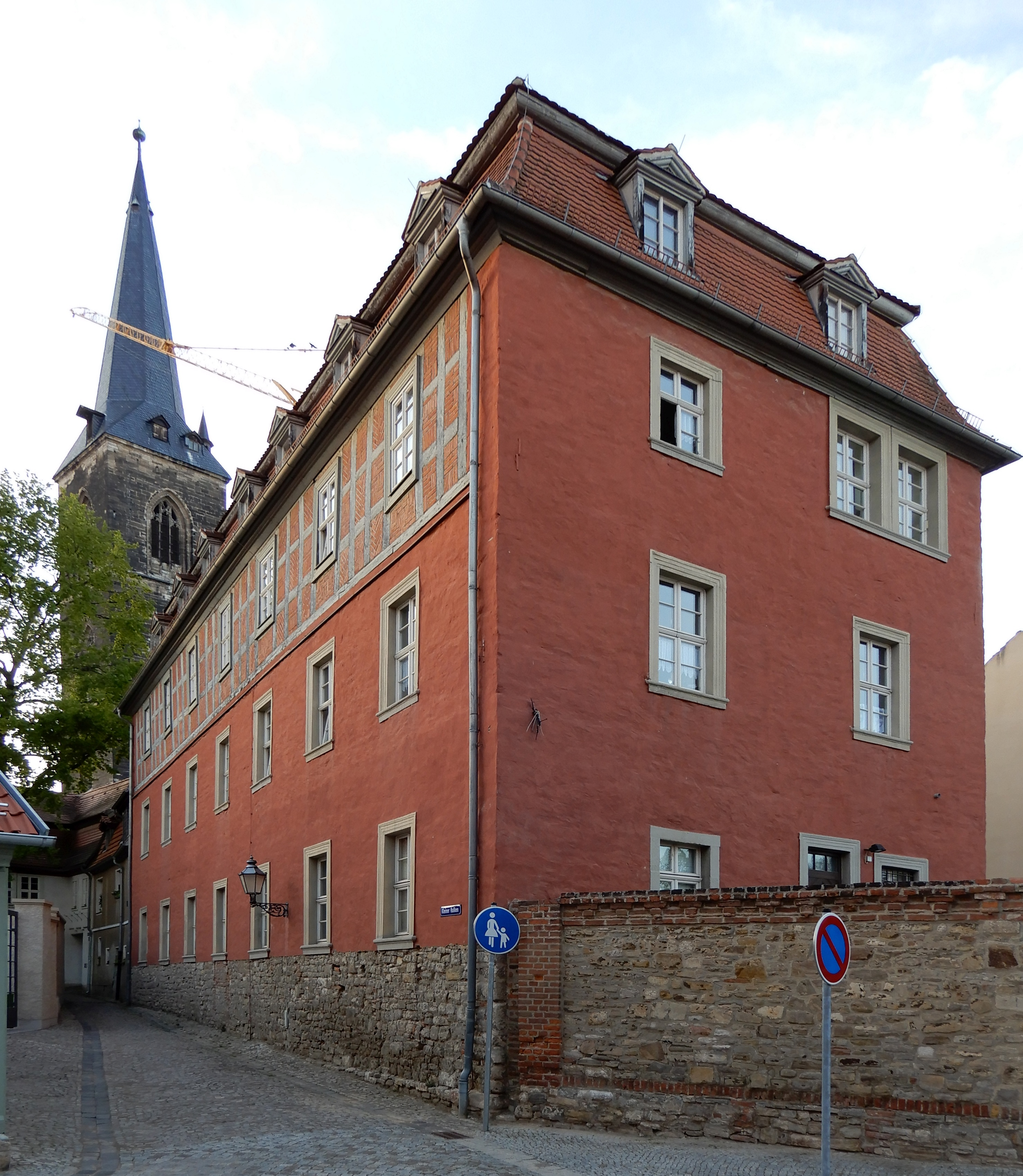 Gebäude Stephanikirchhof 7 vom Kleinen Halken in Aschersleben